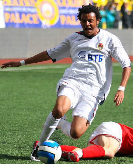 Ramón Osni Moreira Lage